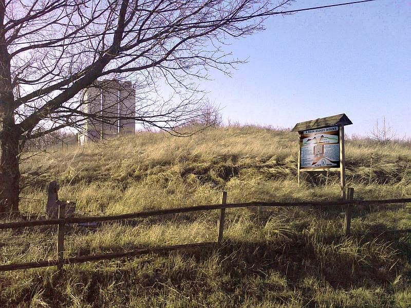 A debreceni Basahalom a 2001-es rendezés után (Vértesi utca)